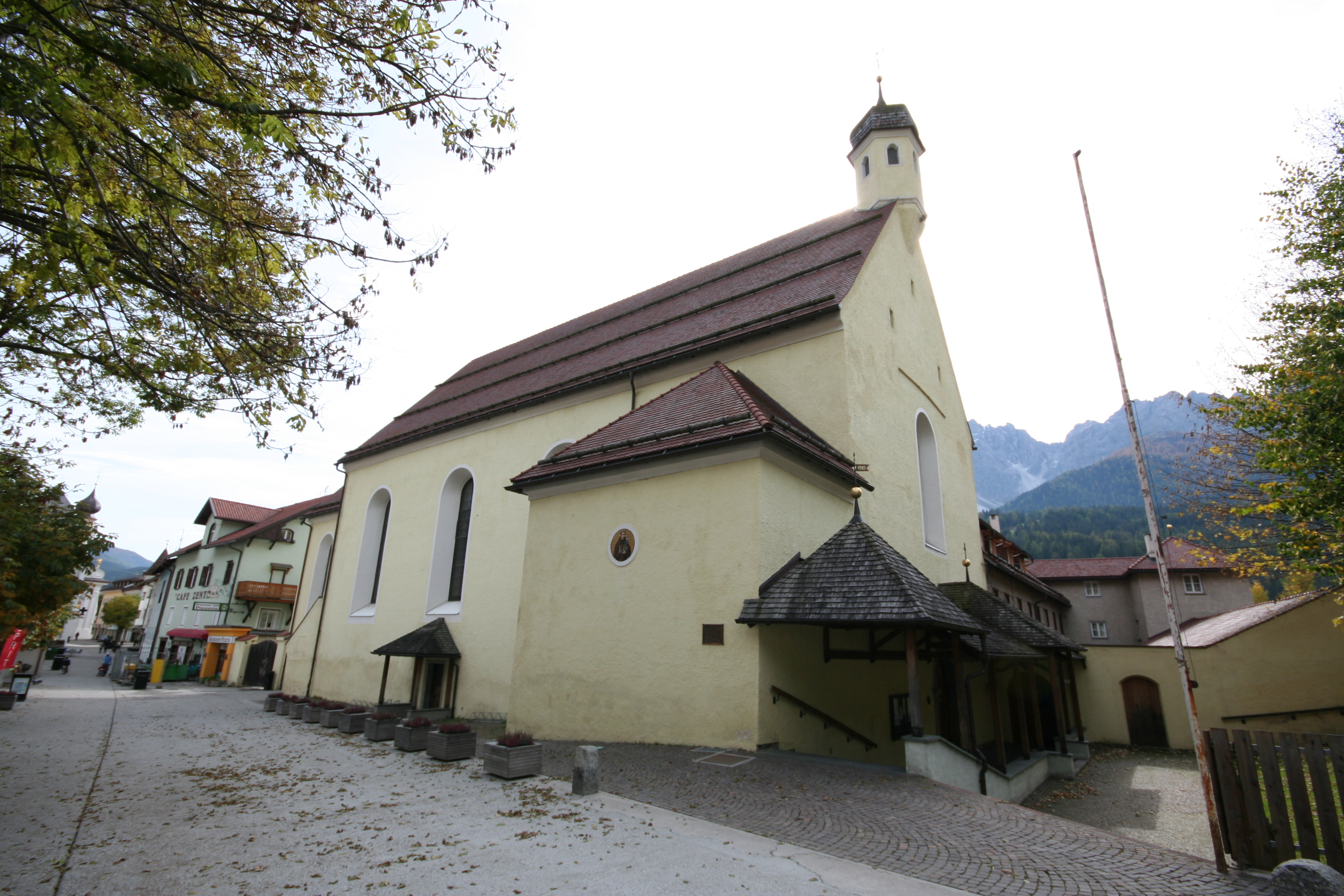 Franziskanerkloster Innichen, Außenansicht